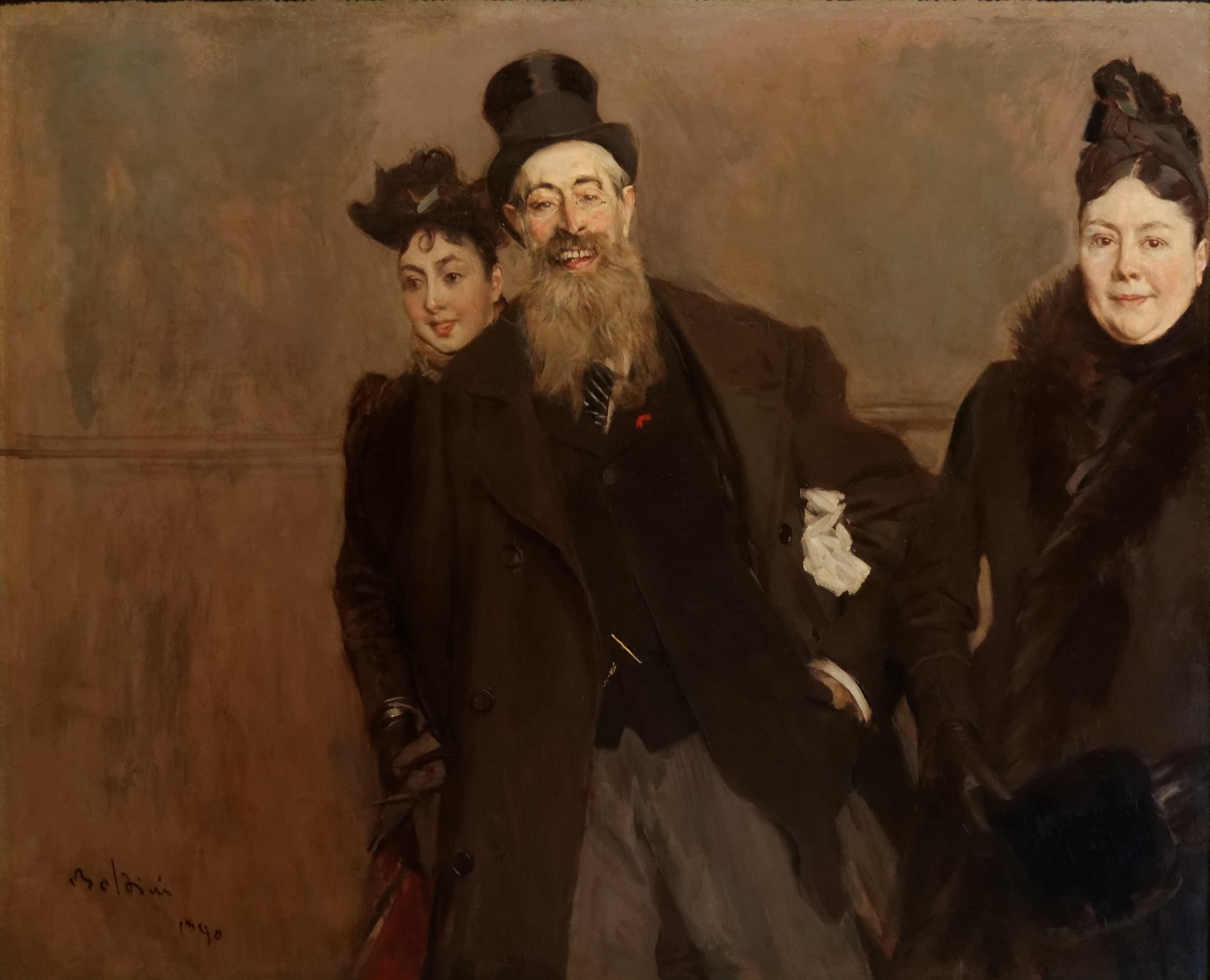 John Lewis Brown avec sa femme et sa fille par Giovanni Boldini. Huile sur toile, France 1890. Exposée au musée Calouste Gulbenkian, Lisbonne. Inv 58